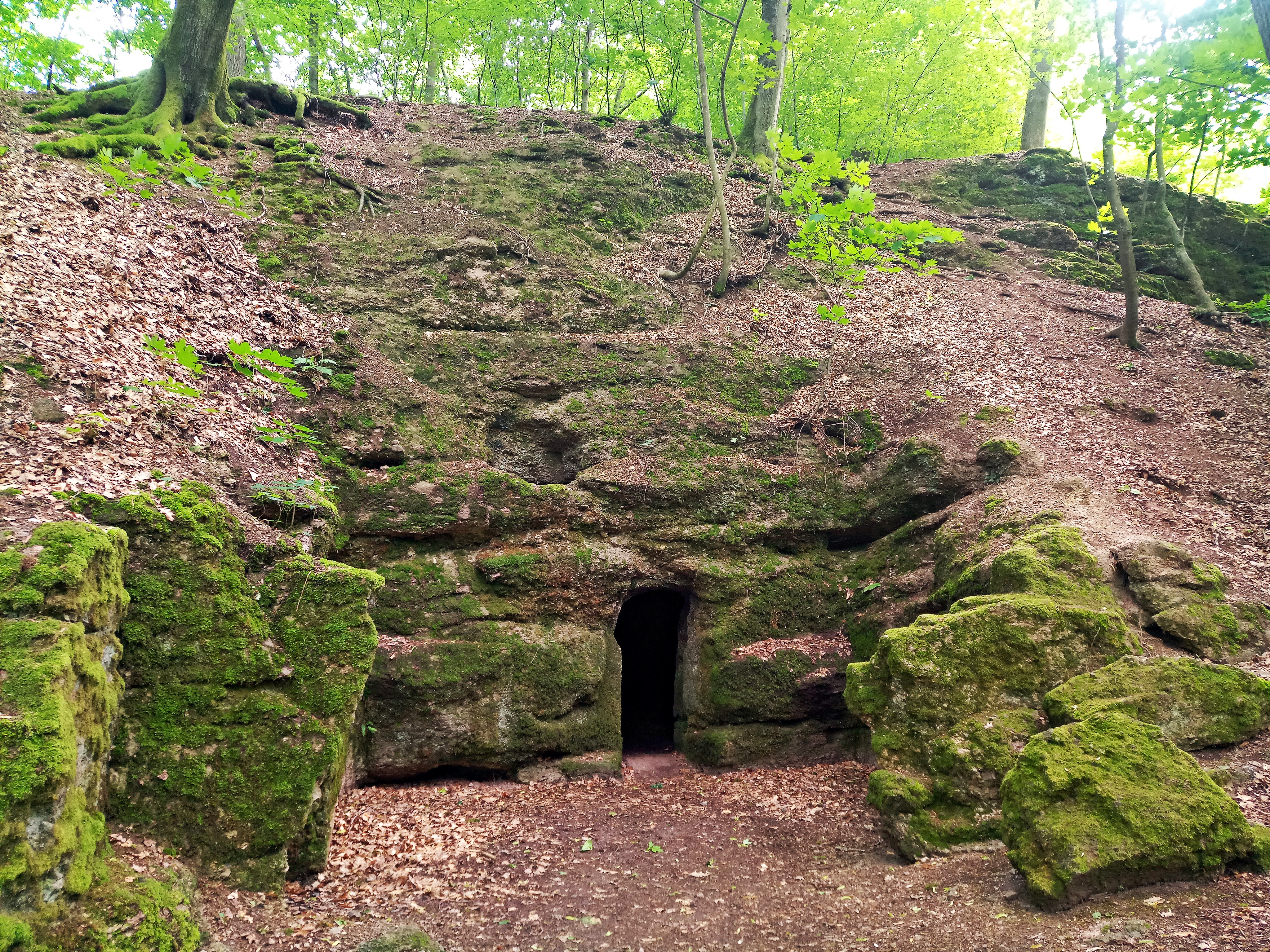 Eremitenklause von außen